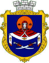 Герб Покровського району